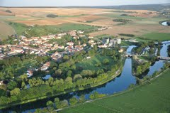 Vue aérienne